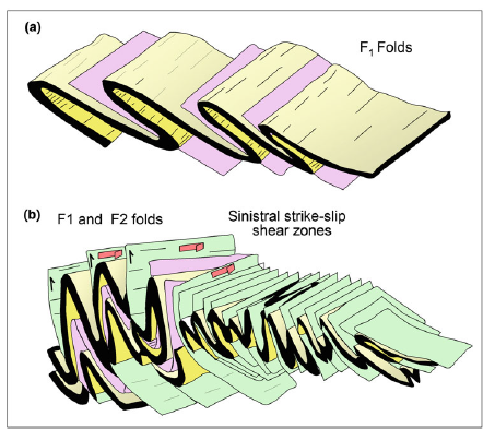 (a) primeira fase de deformação. Dobra com vergência para oeste. Foliação F1 (b) deformação com trend nor noroeste em zona de cisalhamento. Ocorre um redobramento da estrutura inicial.